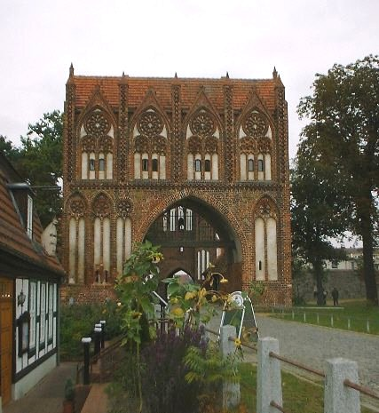 das Stargarder Tor (Feldseite des Vortores) in Neubrandenburg